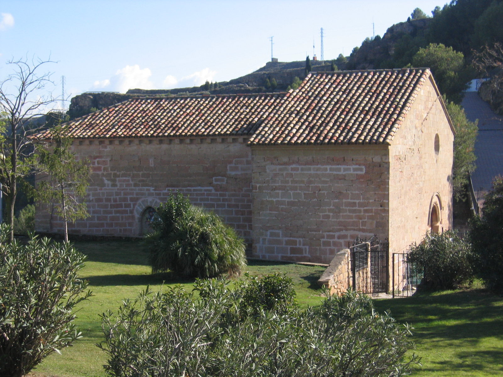 Se trata de una construcción que, partiendo de un núcleo original románico del s.XII, sufrió diversas reformas y ampliaciones entre los ss.XIV y XVI hasta alcanzar su aspecto actual, caracterizado por algunos elementos típicos del llamado Gótico del Bajo Aragón. Tiene fábrica de sillar bien escuadrado. Consta de una nave única con dos capillas laterales comunicadas entre sí en el lado de la Epístola, a modo de pequeña nave lateral, y cabecera recta. Asimismo se añadió otra capilla a los pies, de planta cuadrada, que crea una cierta asimetría en la fachada de los pies. En dicha fachada occidental se abre una sencilla portada en arco de medio punto dovelado sobre la que se observa un óculo de iluminación. Tanto el exterior como el interior destacan por su sobriedad. En el interior llama la atención la decoración de las ménsulas de las que parten los nervios que forman las bóvedas de crucería, así como los motivos heráldicos de las claves de las mismas que, por otro lado, aparecen decoradas con pintura mural.